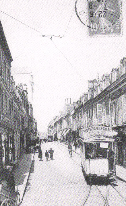 Le tramway du Mans à la fin du XIXème siècle